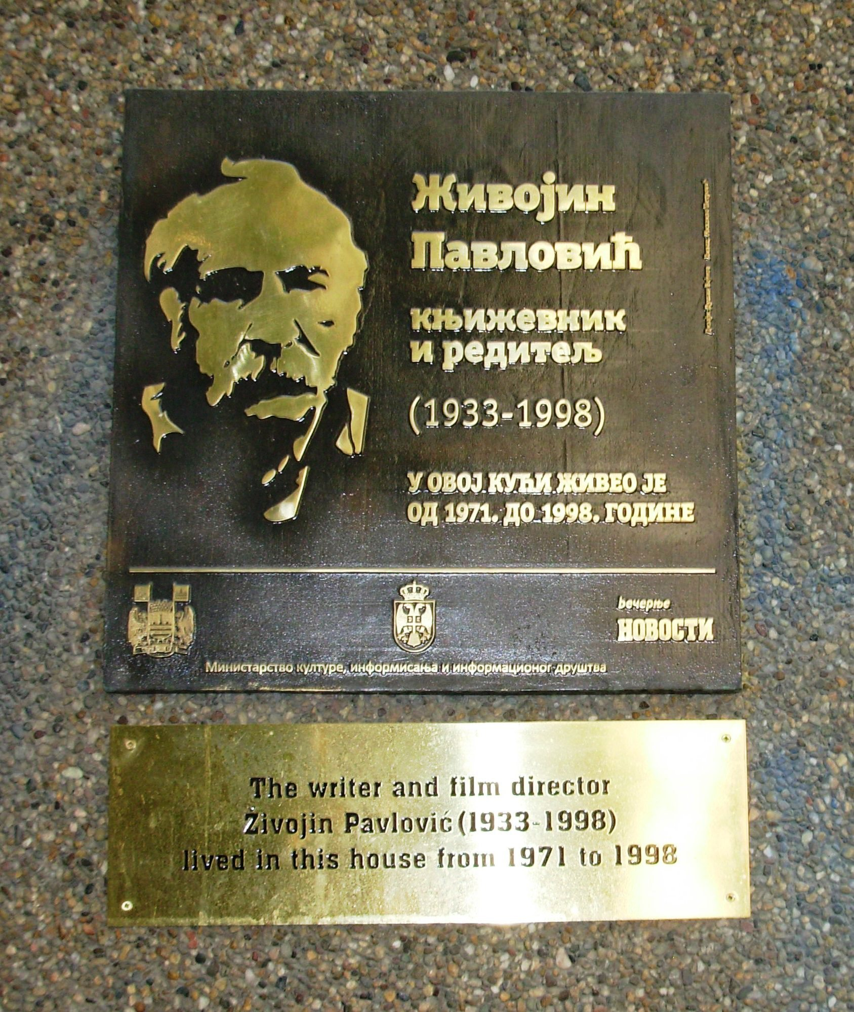 Živojin Pavlović, tabla na zgradi gde je živeo, ulica Majke Jevrosime, Beograd. Slikao Goldfinger